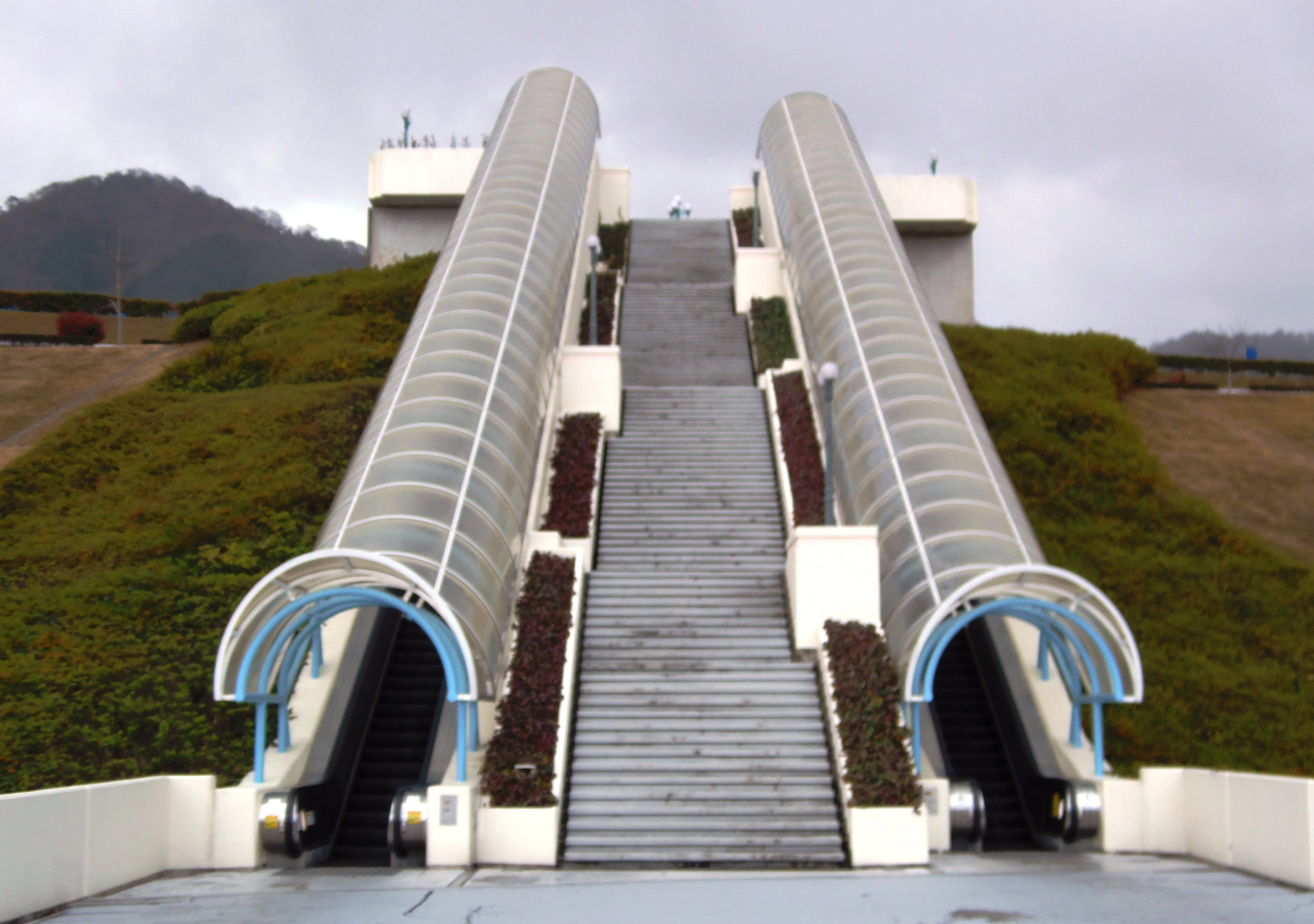 香川県丸亀市綾歌町にあるNEWレオマワールドのゲート前エスカレーター